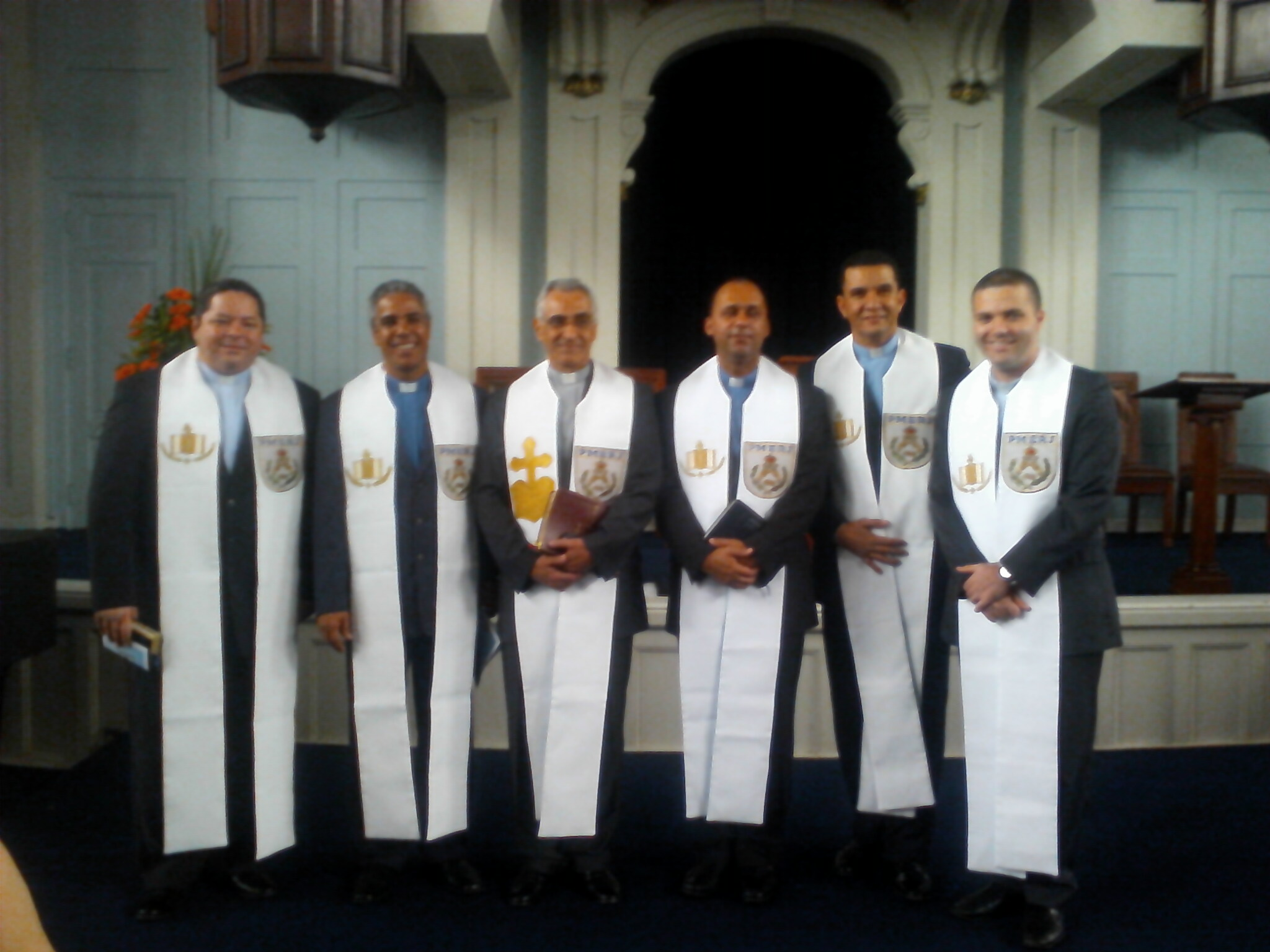 Da esquerda para a direita Pastores: 1º Ten PM Cpl Rogério Vasconcellos dos Santos (Igreja Presbiteriana Renovada do Brasil); Ten Cel PM Cpl Valdenir Gonçalves Aguiar (Batista); Cel PM Cpl Edson Fernandes Távora (Batista)(Comandante); Maj PM Cpl Jorge Luis dos Santos Lacerda (Batista);1º Ten PM Cpl Enoque Rafael (Assembléia de Deus); 1º Ten PM Cpl Douglas dos Santos Marins (Igreja Metodista)